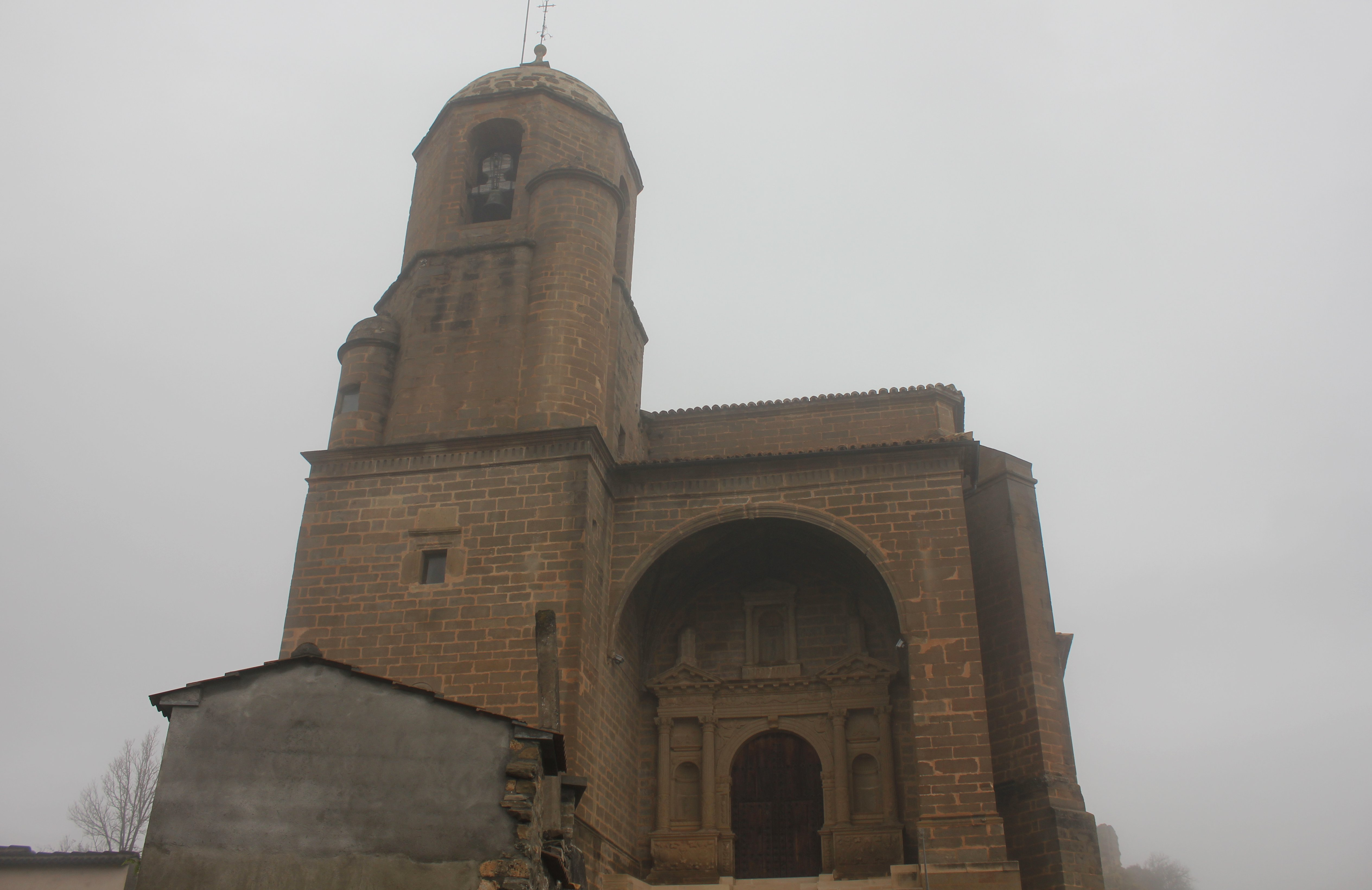 Aragonés: A ilesia de Sta. Olaria, en o Elsón.